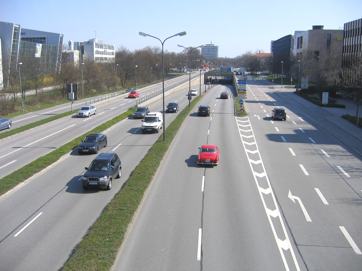 Schenkendorfstraße in München